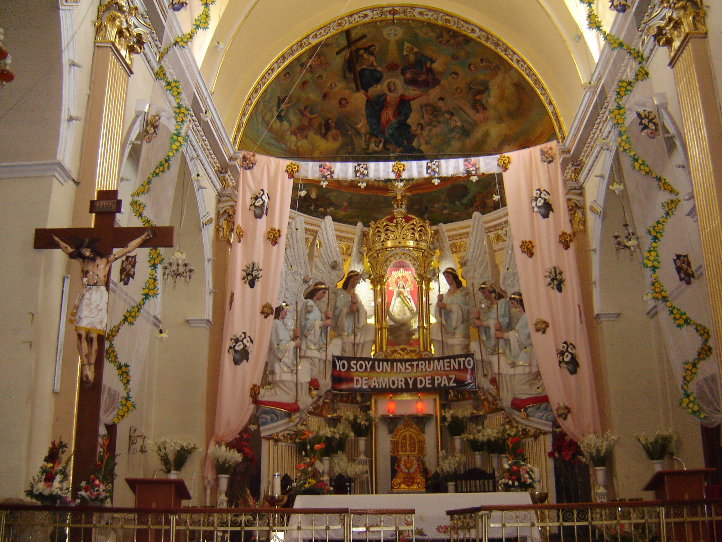 Altar mayor del templo de San Ildefonso de la ciudad de Quillacollo, Cochabamba, con la imagen de la Virgen María de Urqupiña en el centro. Runa Simi: San Ildefonso inlisyaq ñawpaq altarninpi Wirjin Maria Urqupiñaq lantinnin, Killaqullu llaqtapi.